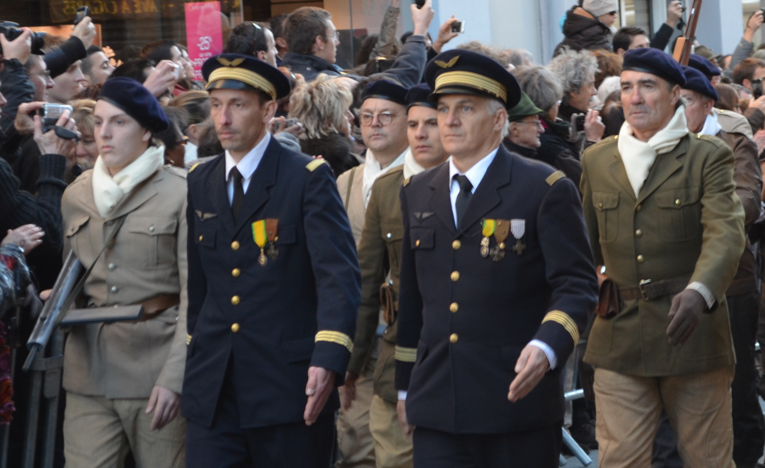 Cérémonie du 70e anniversaire du défilé du 11 novembre 1943 à Oyonnax, le 11 novembre 2013. En uniformes bleus, Henri Romans-Petit et Henry Jaboulay.